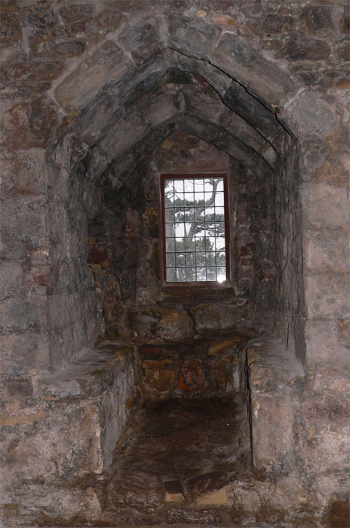 Dirleton Castle (Scotland) - in the donjon